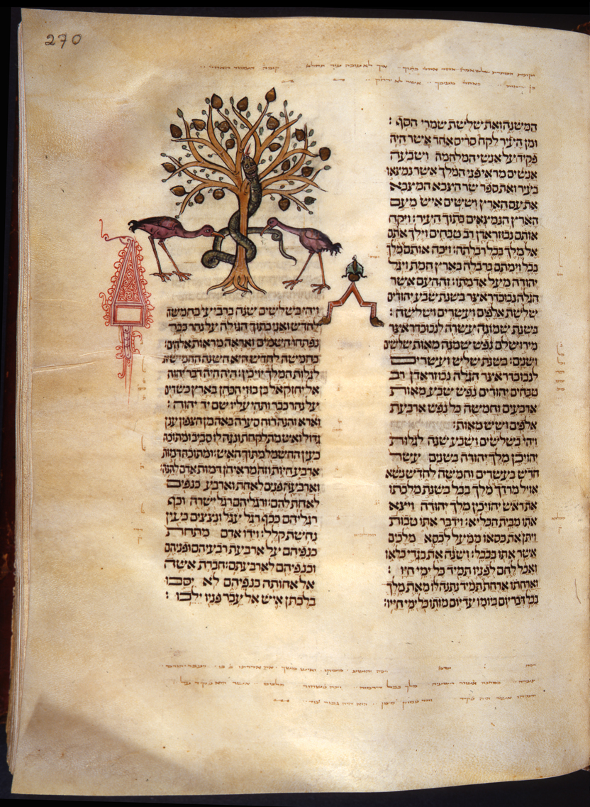 Bíblia de Cervera, Ezequiel (fl 270)